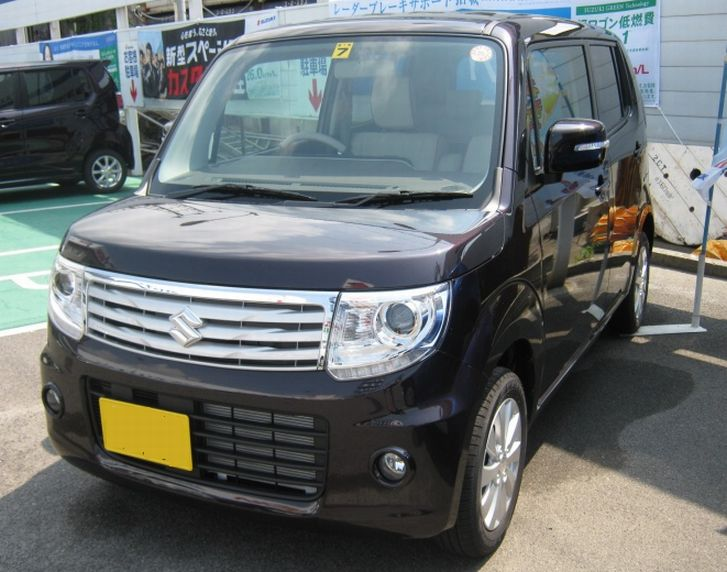 スズキ・MRワゴン